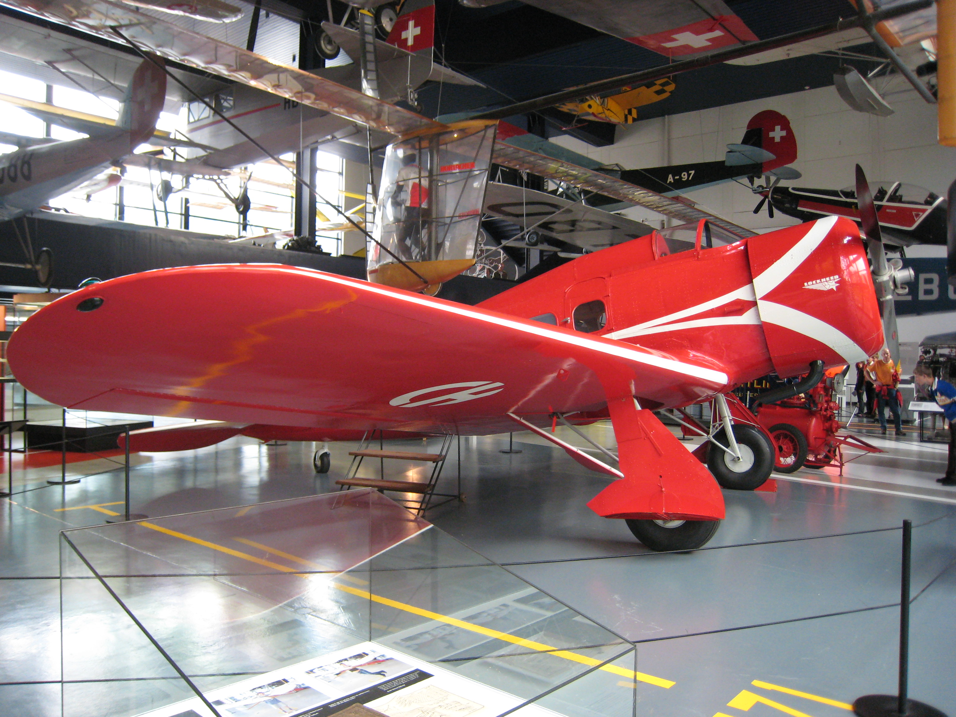 Lockheed Orion im Verkehrshaus der Schweiz